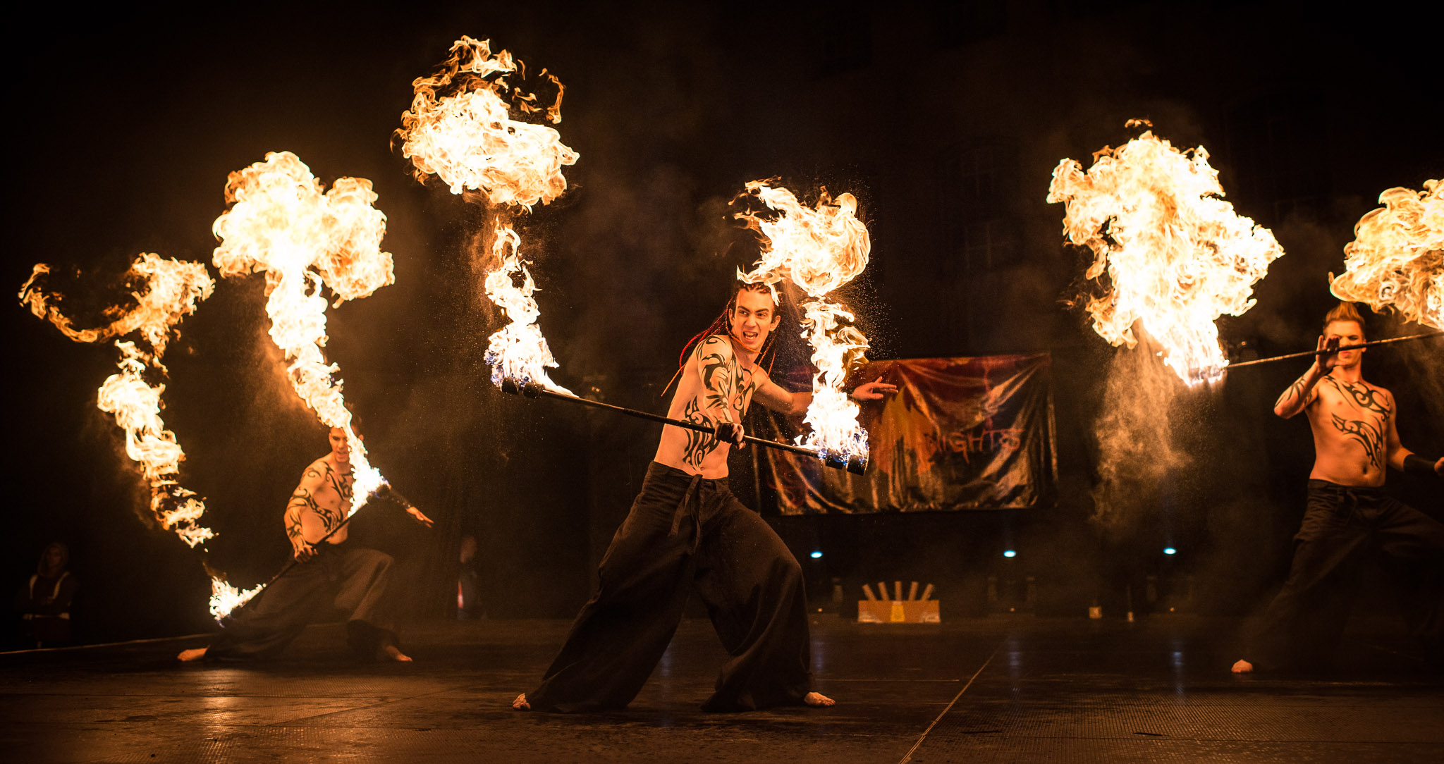 Vystoupení skupiny Pyroterra na žonglérsko-hudebním festivalu Flaming Nights 2013